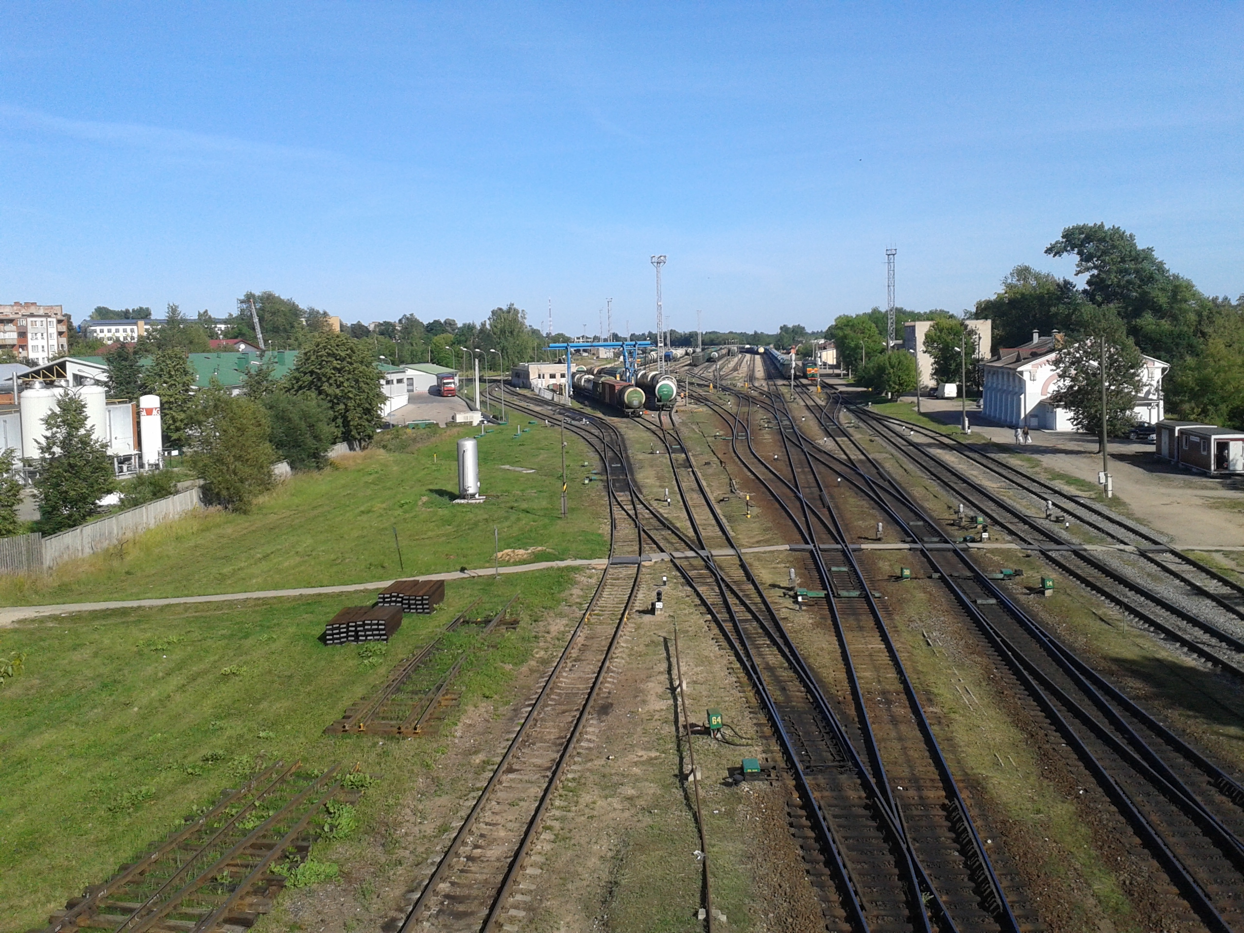 sliežu ceļi. stacija Rēzekne II no viadukta. 2015. g. augusts.